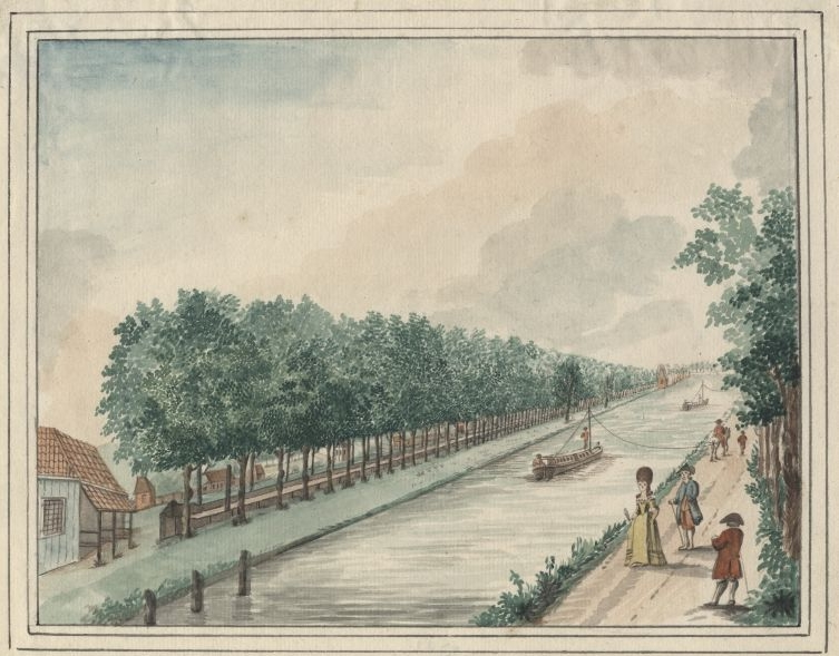 Gezicht op de Trekvliet in Leiden getekend door Jacob Timmermans. 1788